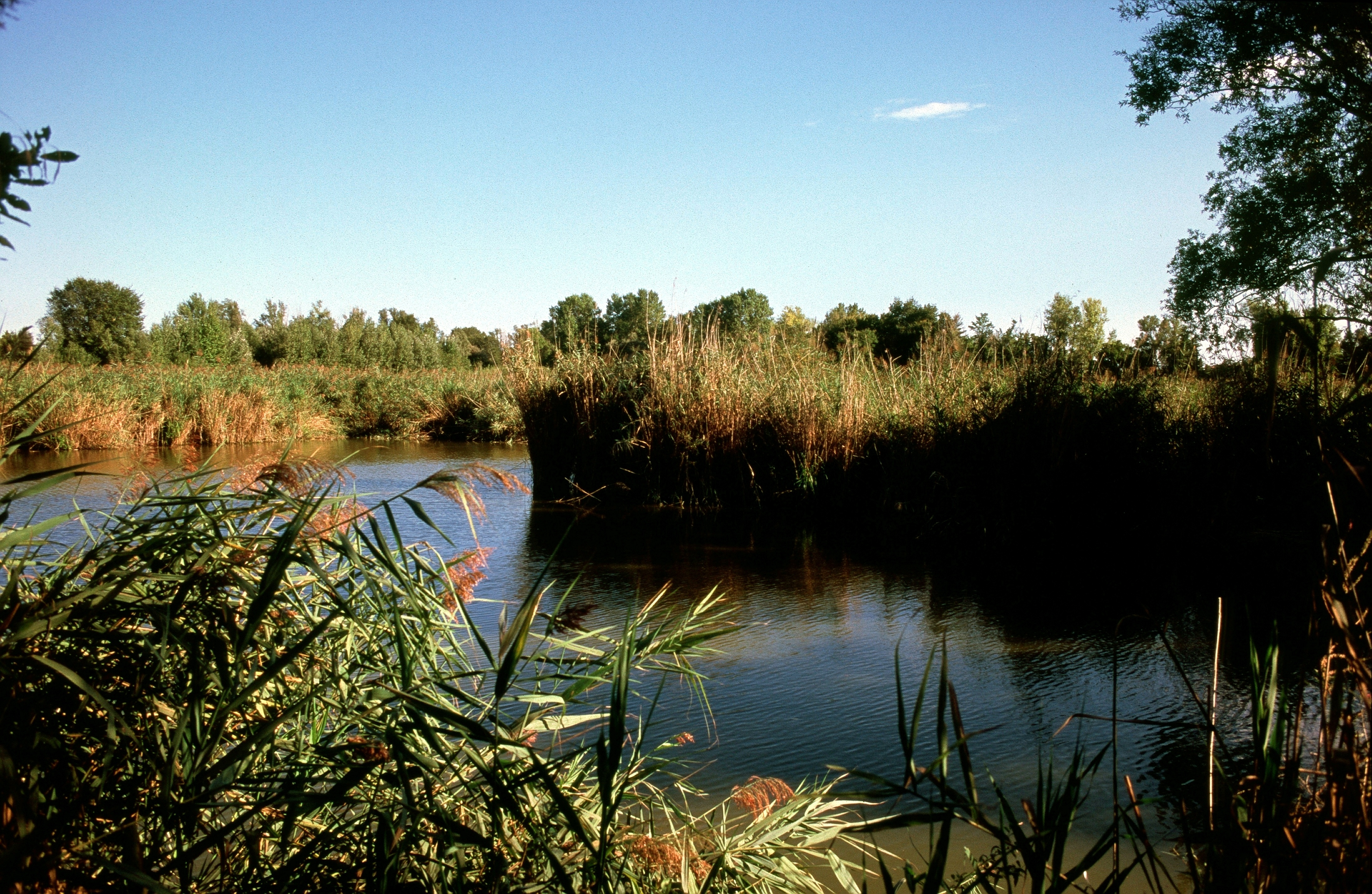 Canali laterali al percorso dell'oasi WWF di Noale, durante un'escursione fotografica a inizio Settembre. La foto è stata scattata tramite una feritoia di un cancelletto. Canon A-1, obiettivo 28mm, pellicola Fujifilm Velvia 100. This is a photo of a monument which is part of cultural heritage of Italy. The authorisation for taking photos of this object was provided by the World Wide Fund for Nature Italy.